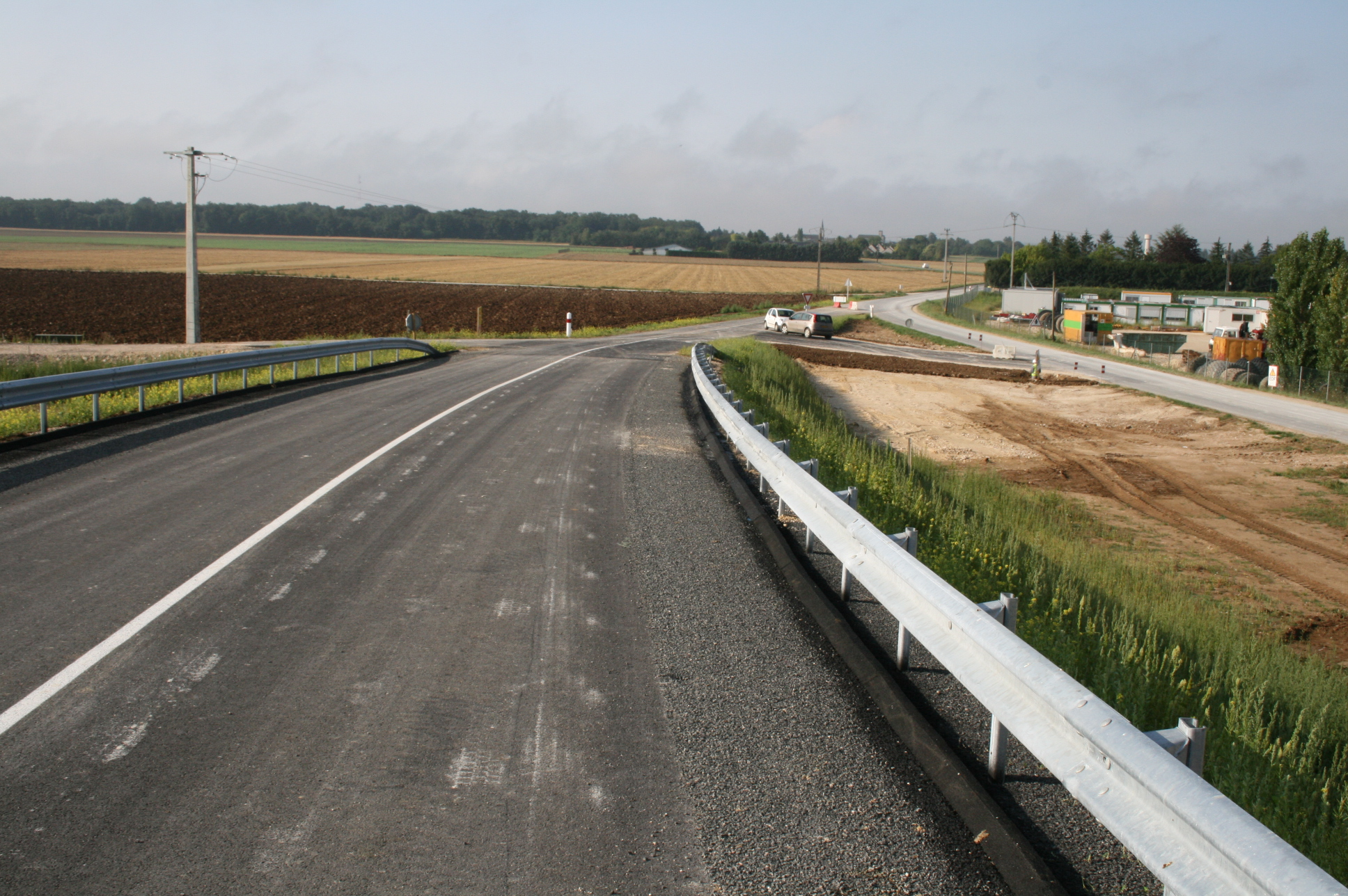 Glissières de sécurité sur uen route départementale (France)